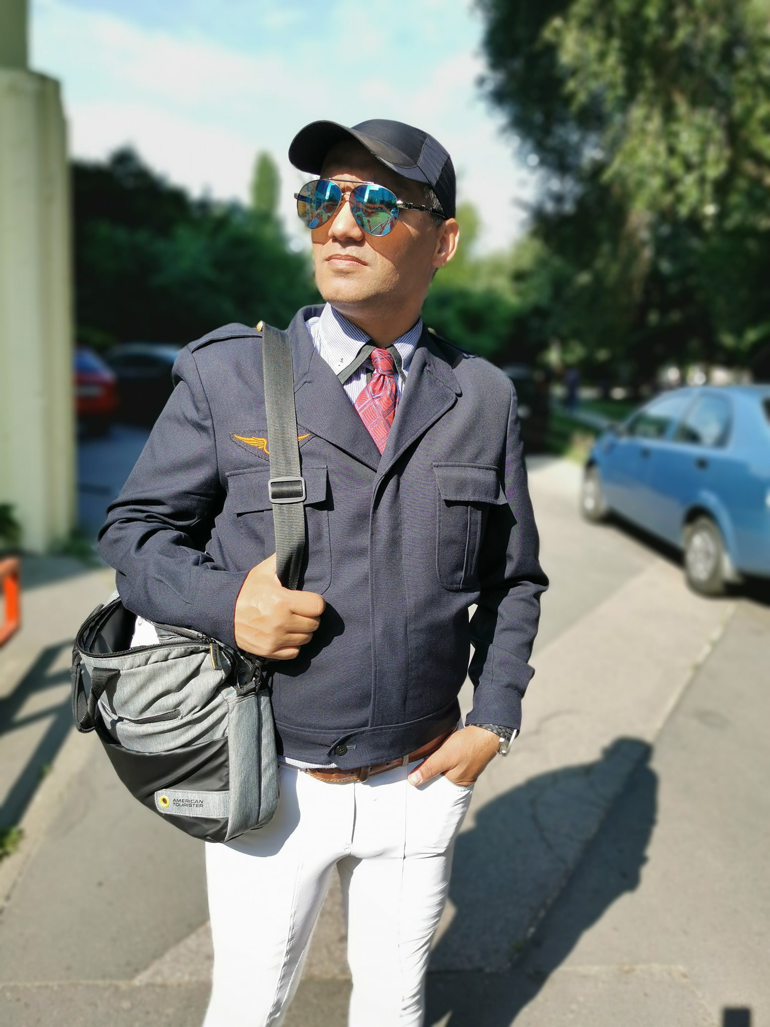 Fényhozó